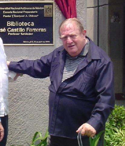 José Castillo Farreras, en la ceremonia donde fuera nombrada la biblioteca que lleva su nombre.